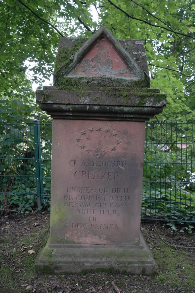 Grab des Theologen Leonhard Creuzer (1768–1844) auf dem Friedhof am Barfüßertor in Marburg